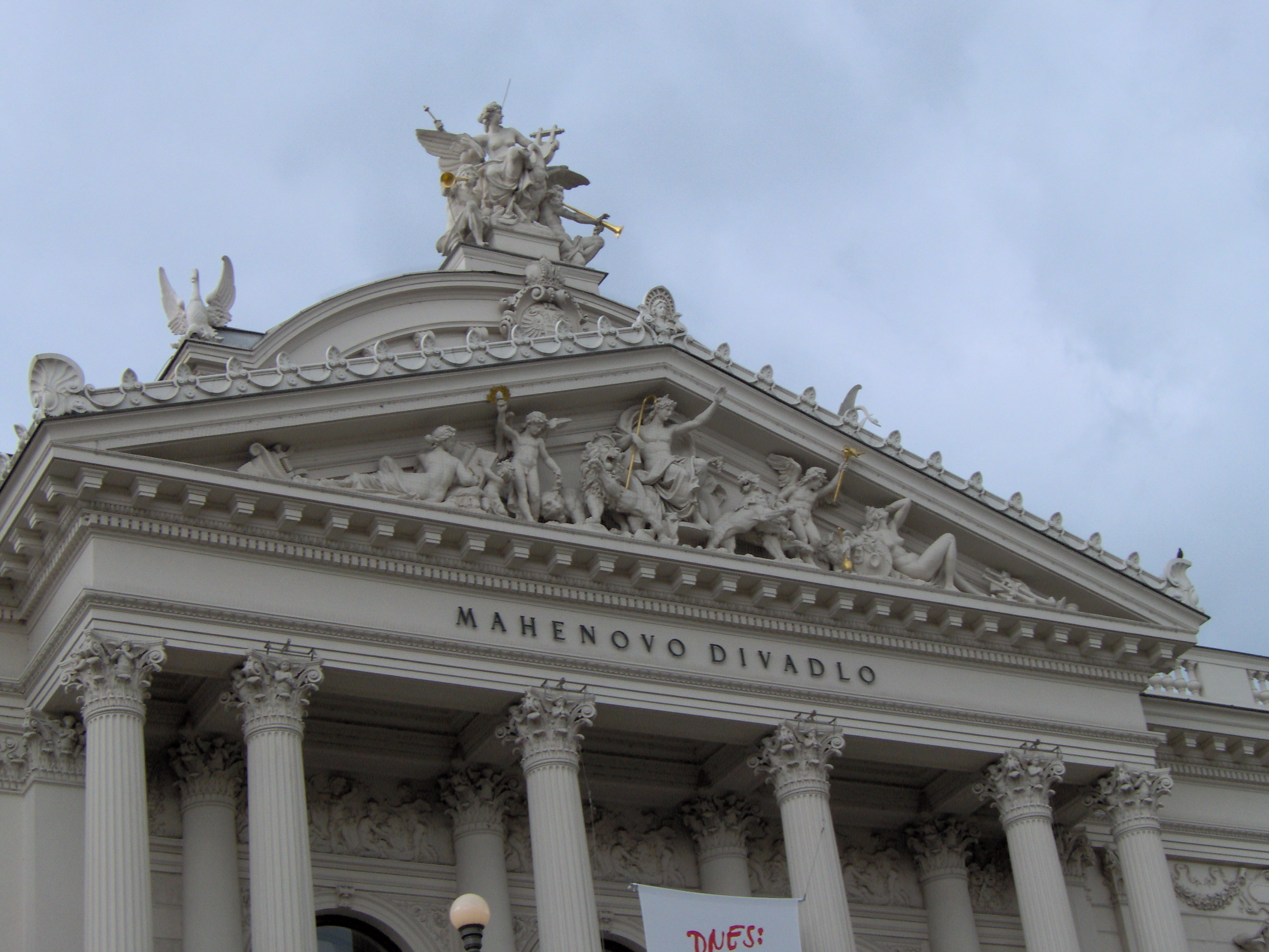 Mahenovo divadlo v Brně